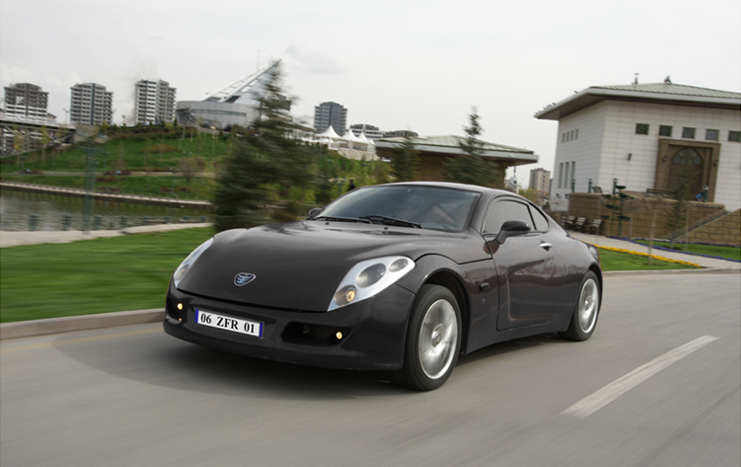 Etox Zafer near Göksu Park in Eryaman, Ankara, Turkey